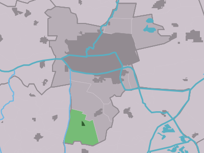 Kaartsje fan himrik fan Wytgaard